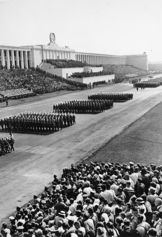 Nünrberg, Reichsparteitag, RAD-Parade Reichsparteitag 1937 Der große Appell des Reichsarbeitsdienstes auf der Zeppelinwiese. Während des Vorbeimarsches der 38000 Arbeitsdienstmänner.